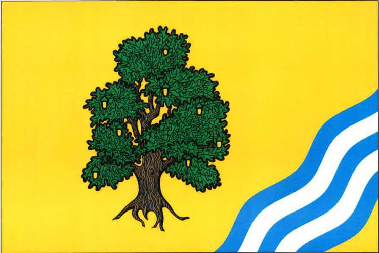 vlajka, Čížkov, okres Plzeň-jih